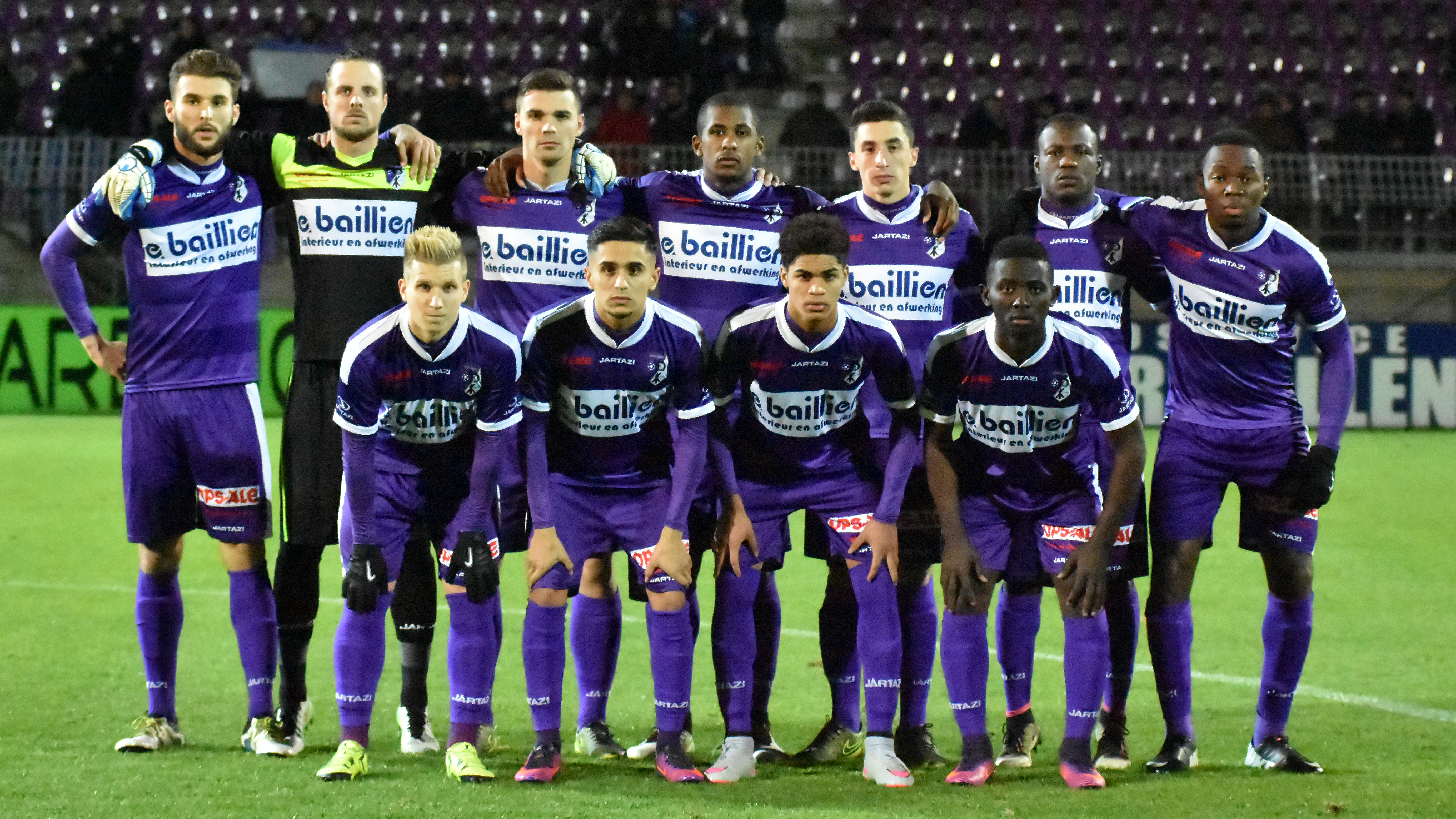 De selectie van Patro Eisden Maasmechelen op 5 nov 2016: staande vlnr Danilo Sarkic - Lars Knipping - Jessy Mayele - Daniele Zotti - Ruben Jansen - Kevin Aka Etien - Henry Bolaji Odutayo Voorste rij: Steve Otte - Adil Lagouireh - Johan Ella Ella - Etienne Wala Zock